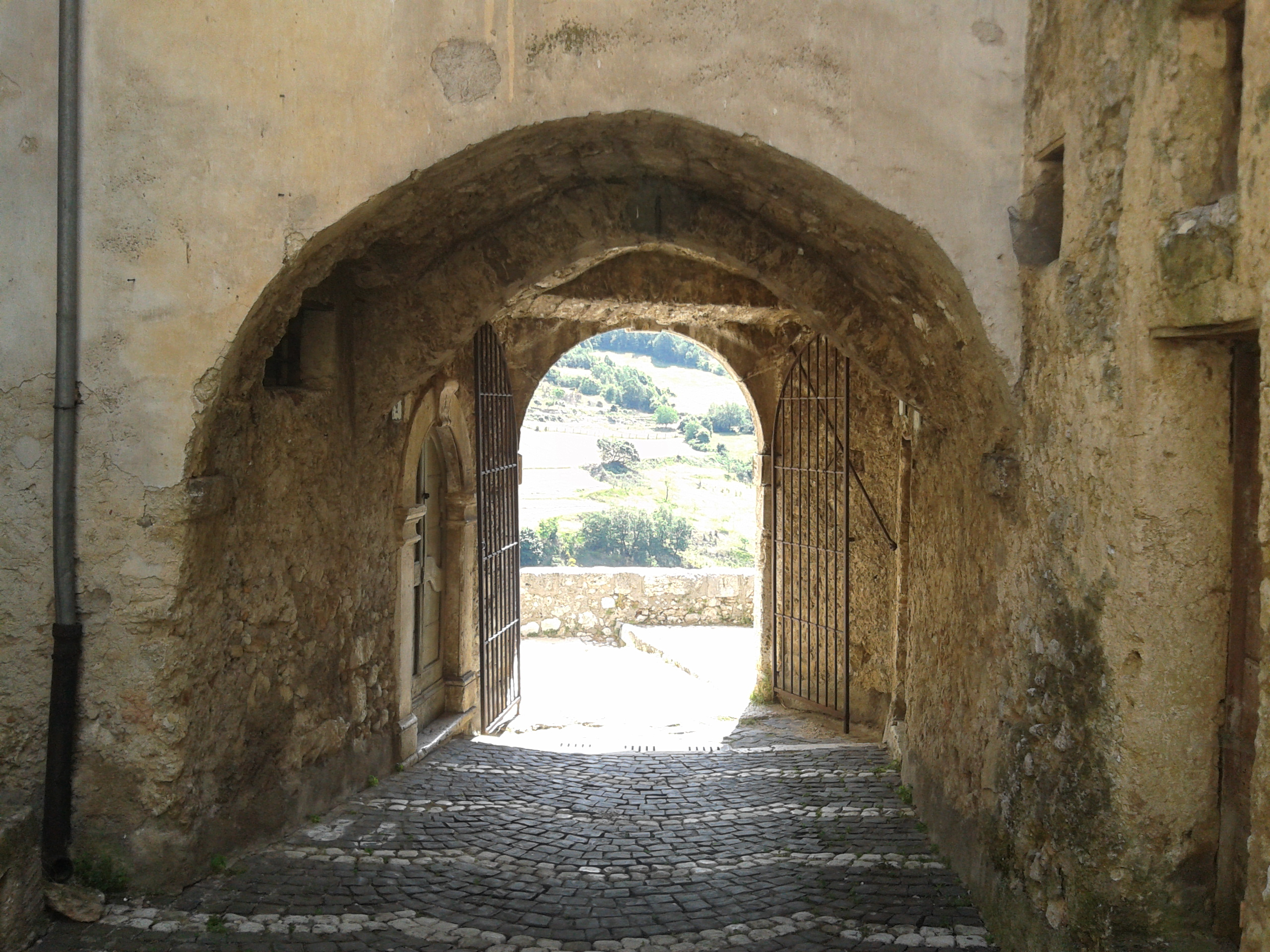 Arco di Porta Flora